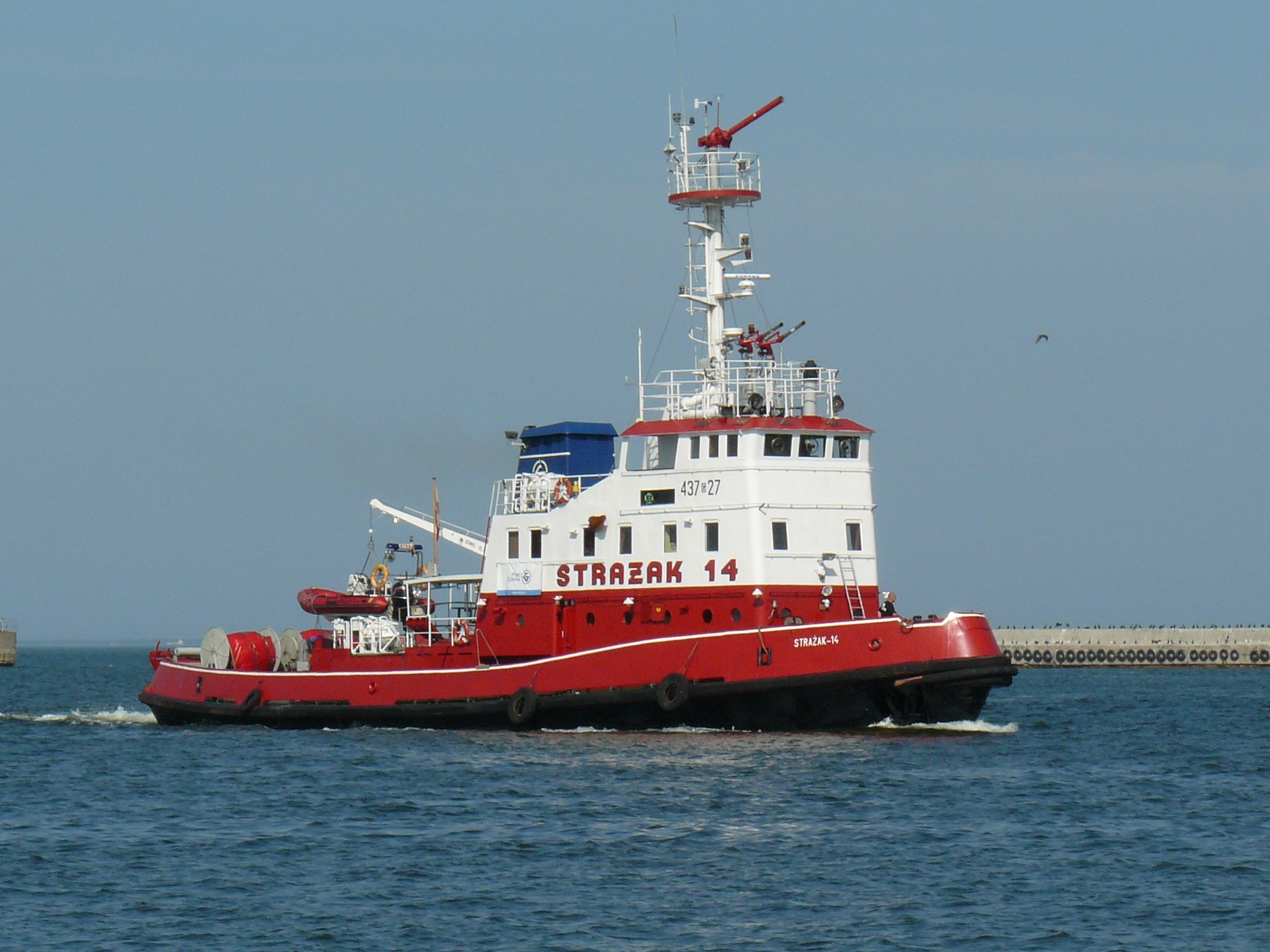 Strażak 14 - statek pożarniczy wyprodukowany w 1977r. w Gdyni – Stocznia Remontow a NAUTA.